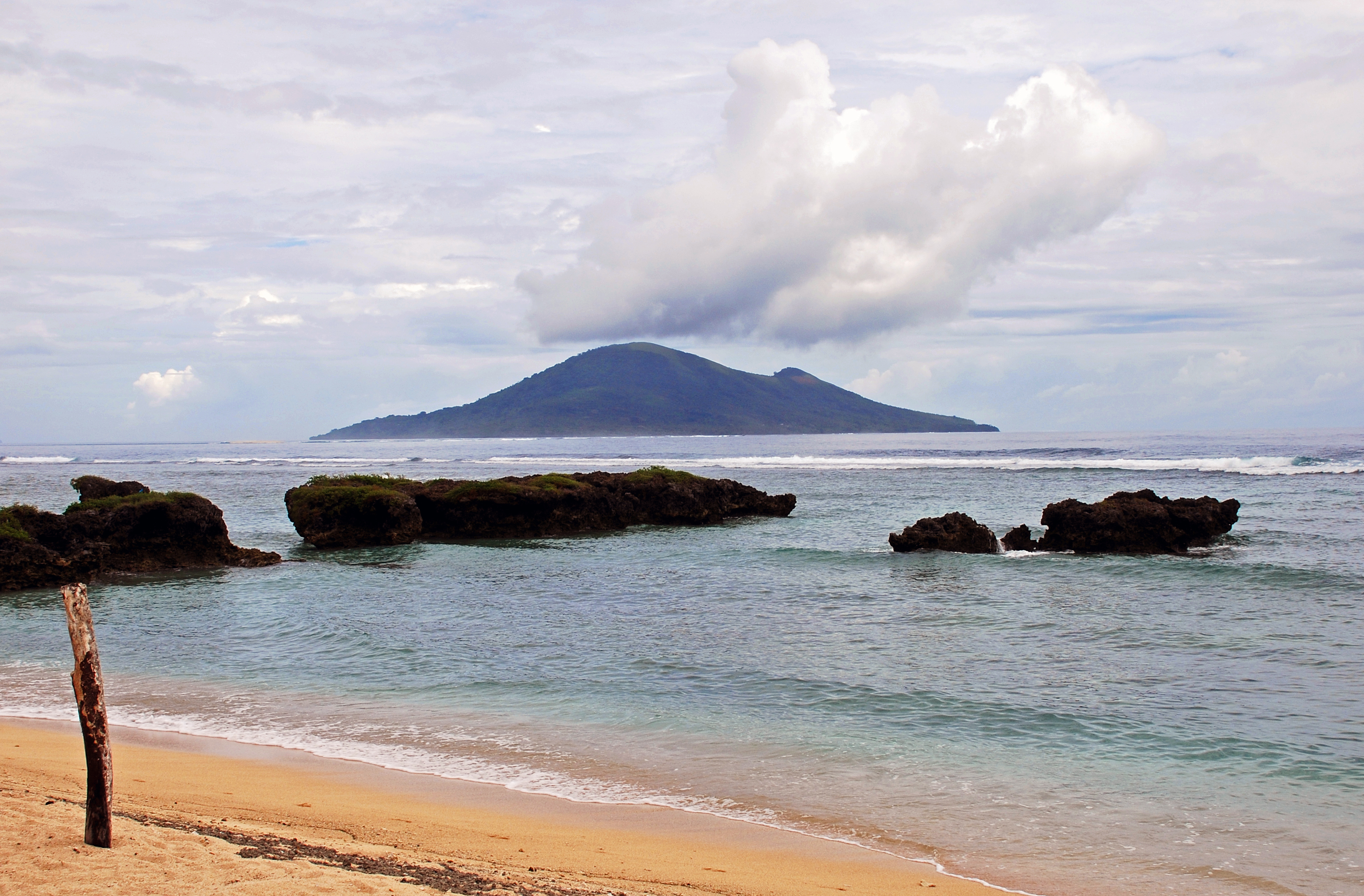 Emao from Matarisu — around Efate (Vanuatu) trip, 26 Nov. 2006